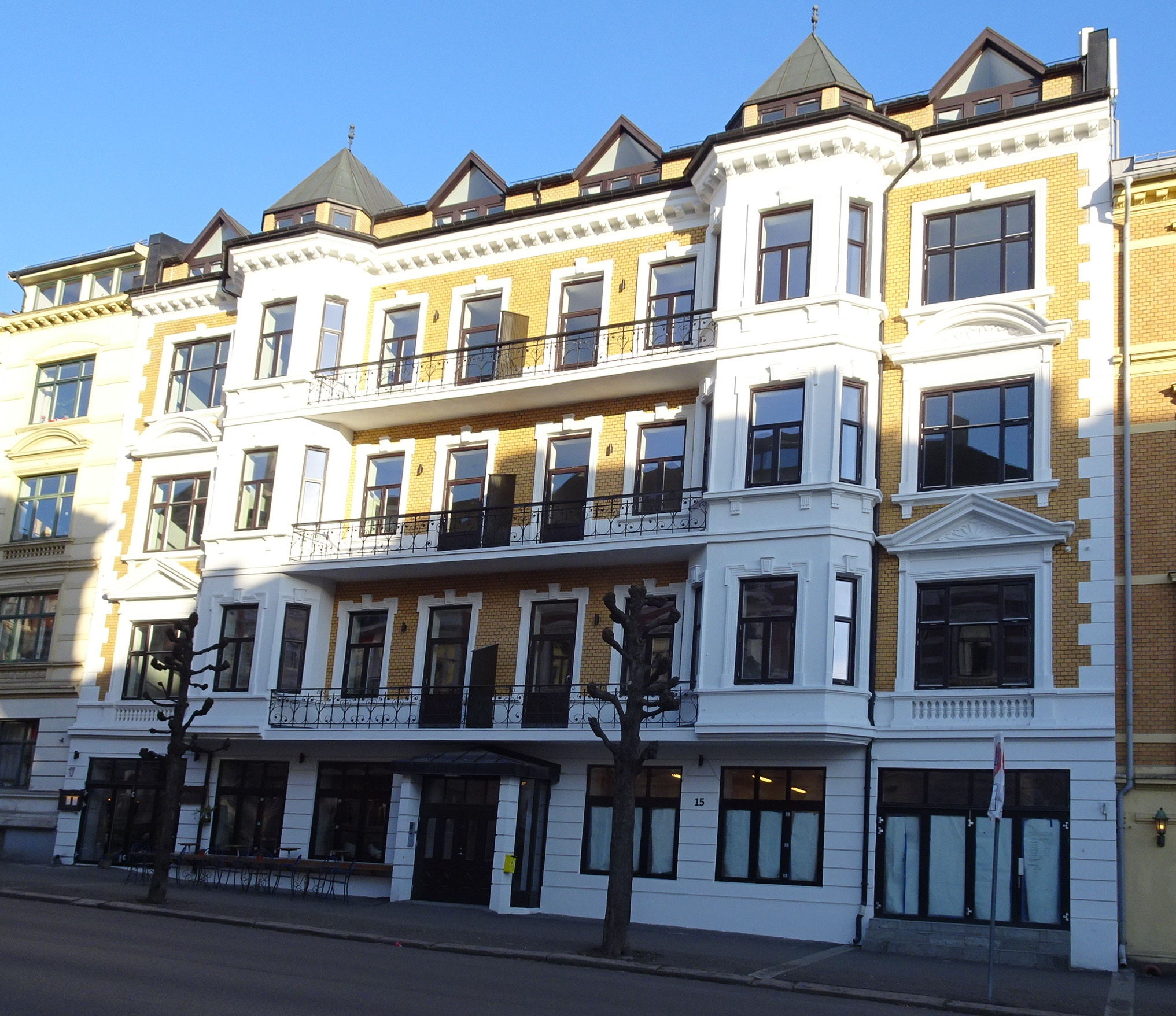 Skovveien 15. Arkitekt: Alfred Køhn (1896).